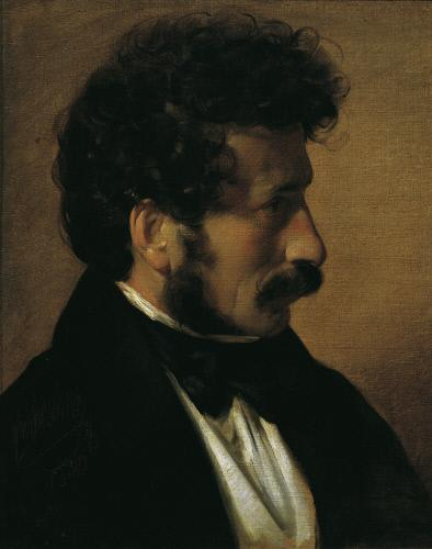 Friedrich von Amerling Porträt Theodor Alconiere 1836